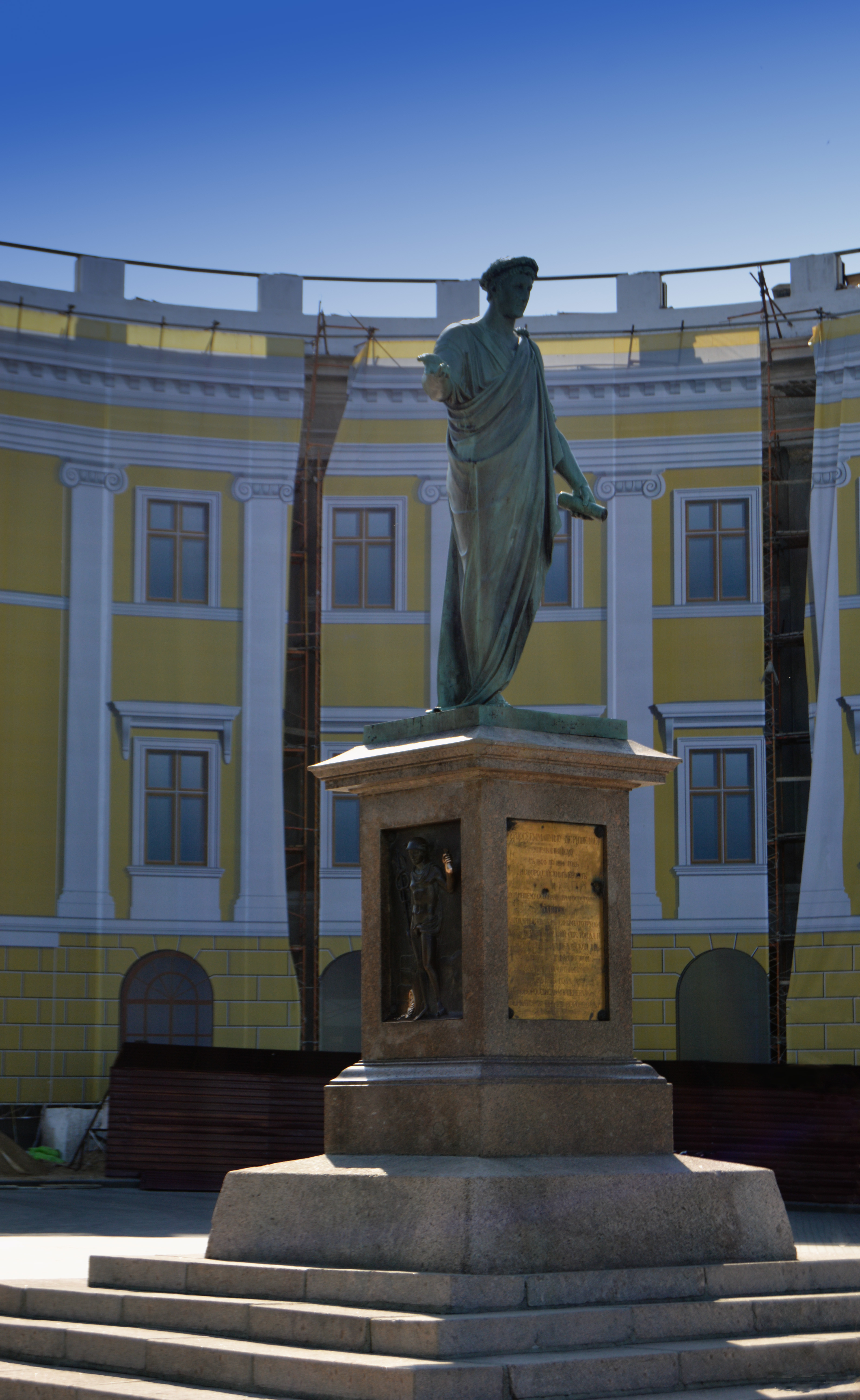 Памятник генерал-губернатору